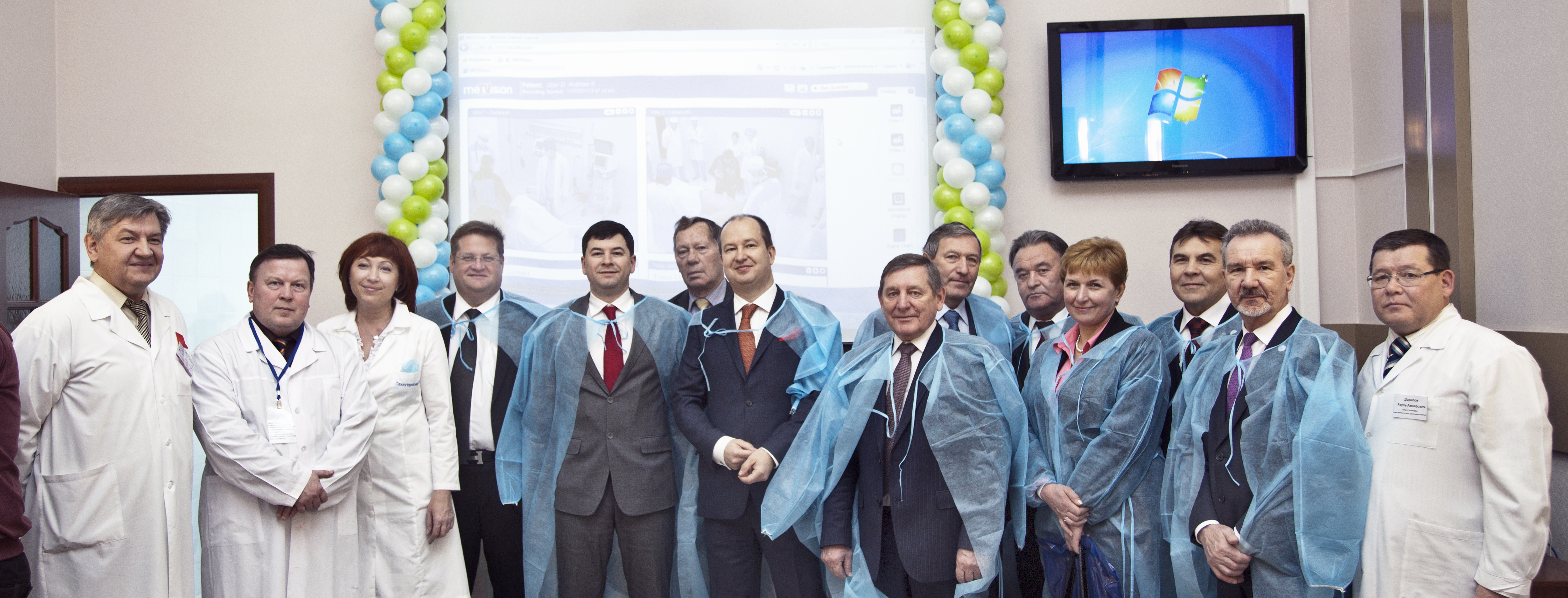 Павлов Валентин Николаевич (седьмой слева) — хирург, уролог; доктор медицинских наук, профессор; ректор Башкирского государственного медицинского института. С коллегами на открытии Центра симуляционного обучения БГМУ.